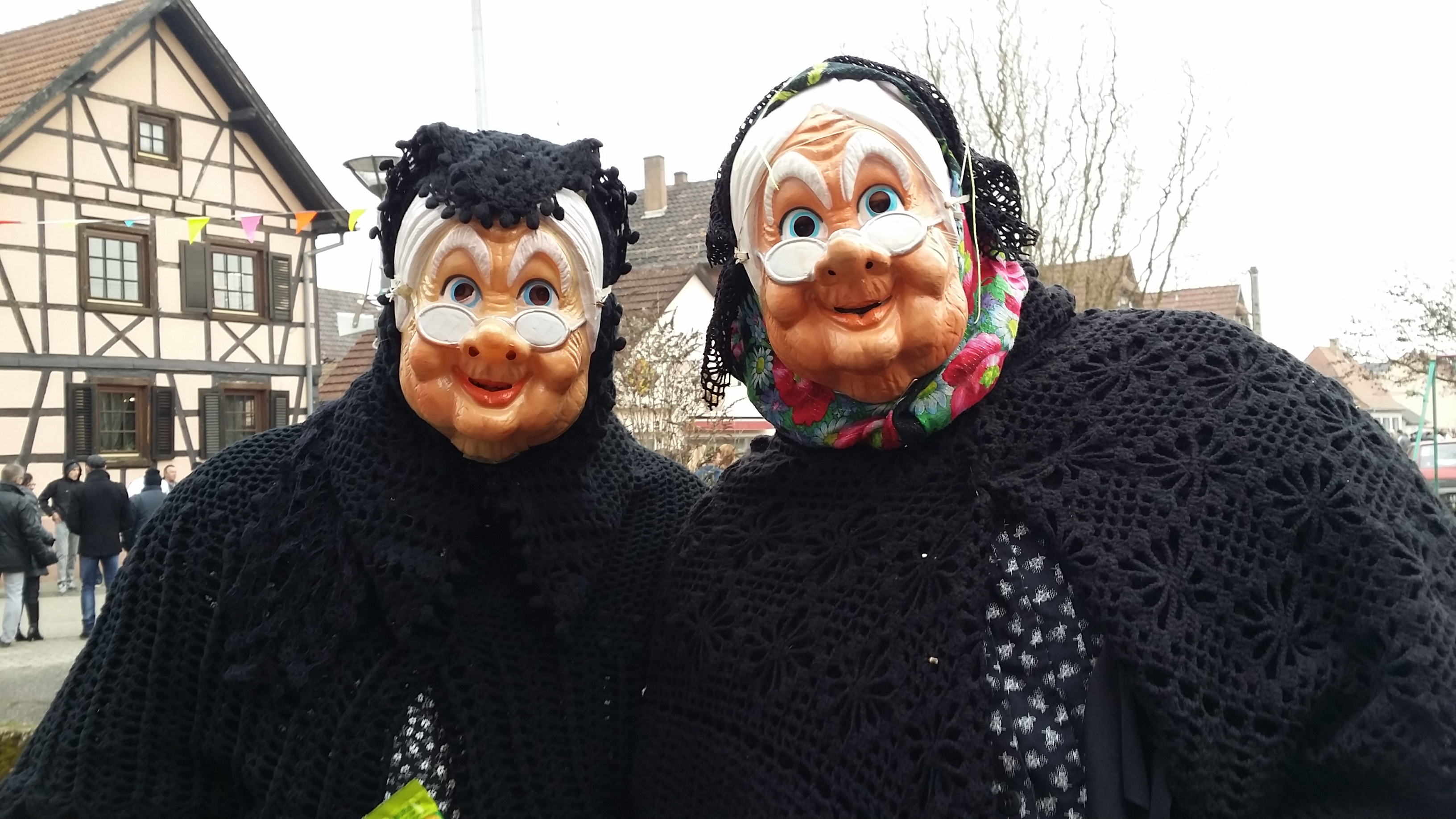 Masques et costumes traditionnels des "Fasenachtbutze" du carnaval de Mothern